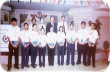 TORCY 2004 Awardees